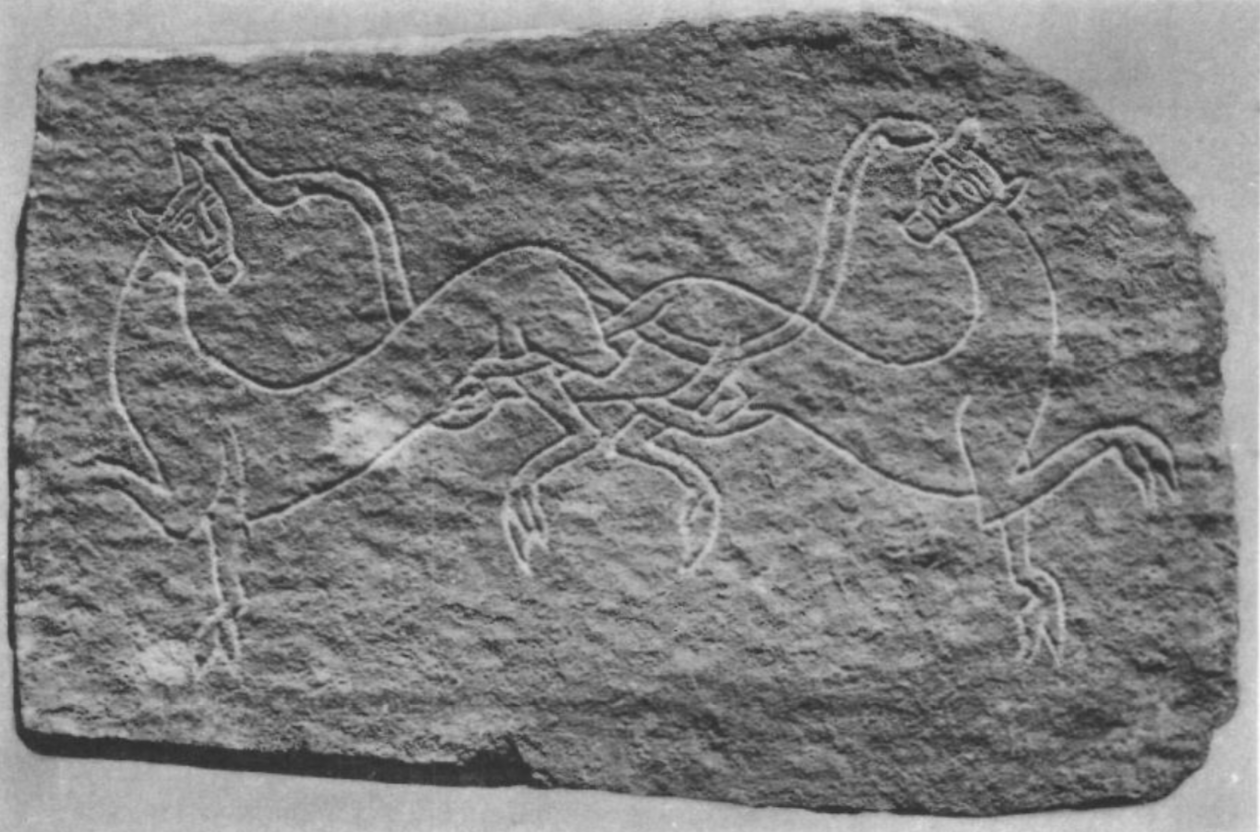 Runstensfragment som hittade 1865 i Balingsta kyrka tillsammans med runinskrift U 851. Idag inmurad i Vik slotts förstuga.